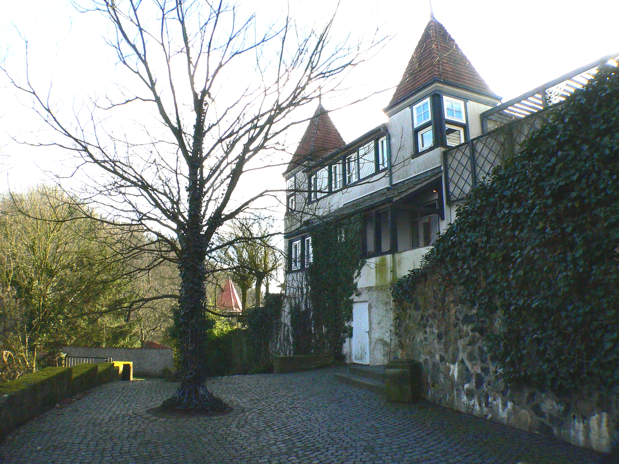 Gudensberg (Hessen), "Wenigenburg"